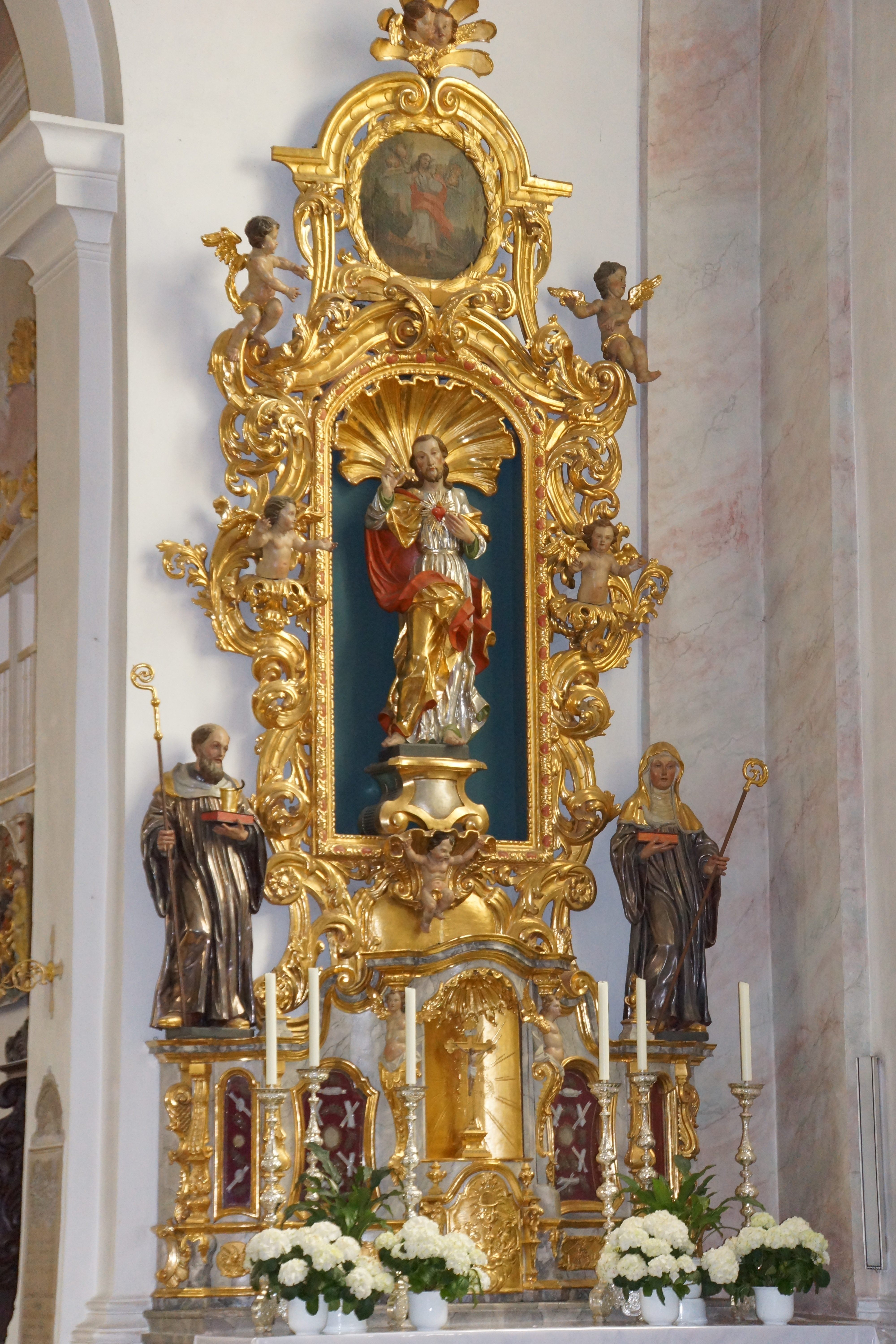 Die katholische Pfarrkirche St. Johannes der Täufer in Hemau in der Oberpfalz